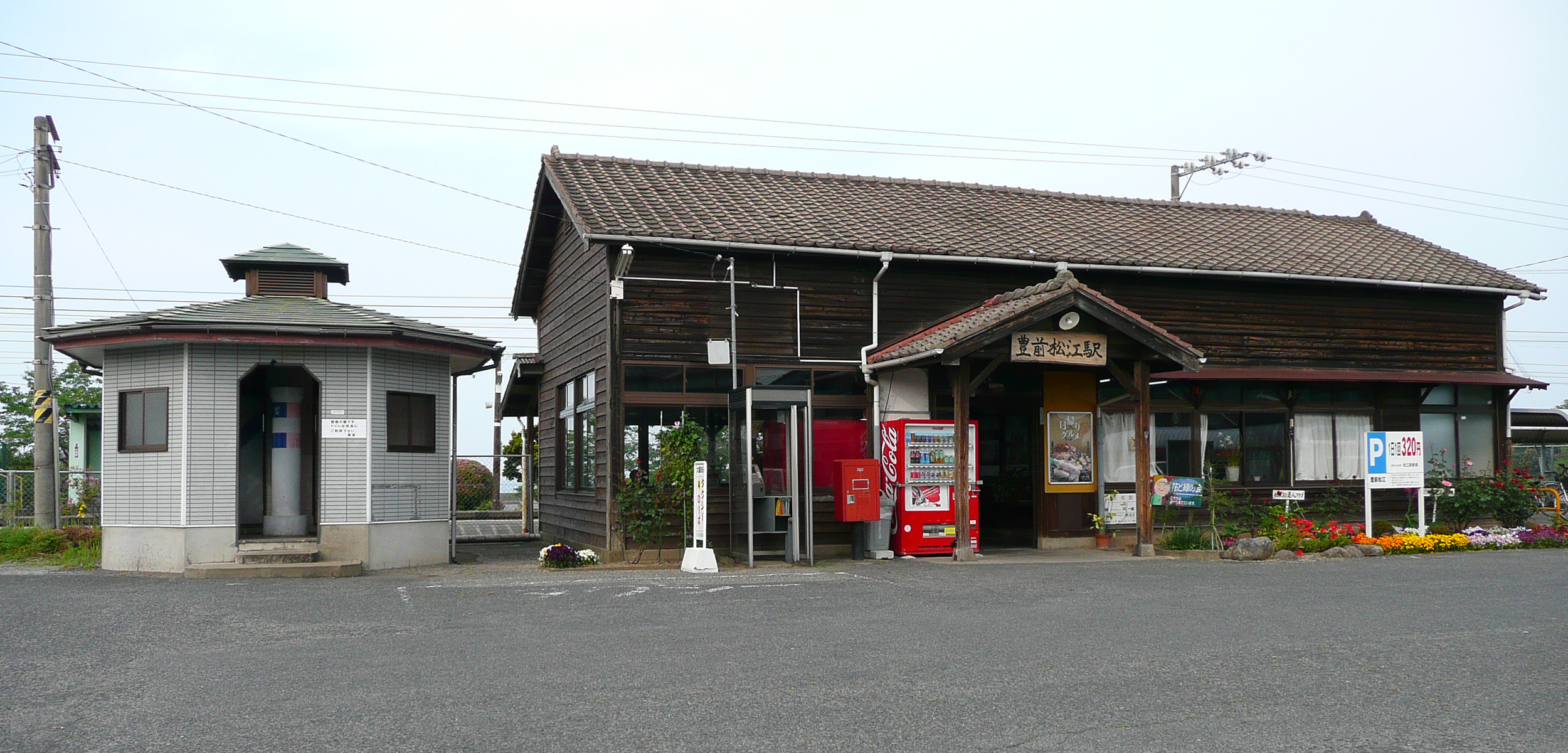 日豊本線・豊前松江駅（2007年撮影）